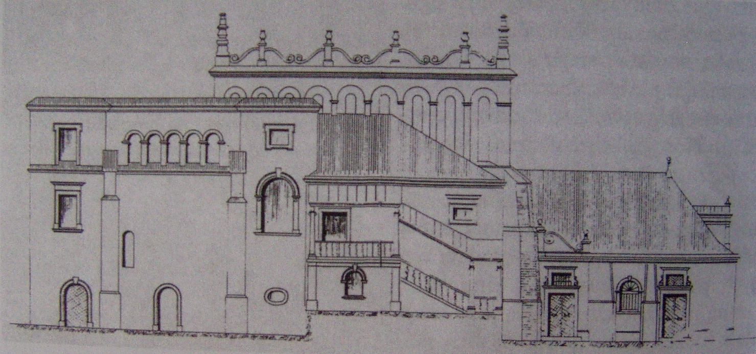 Projekt restauracji Starej Synagogi w Krakowie (1904)